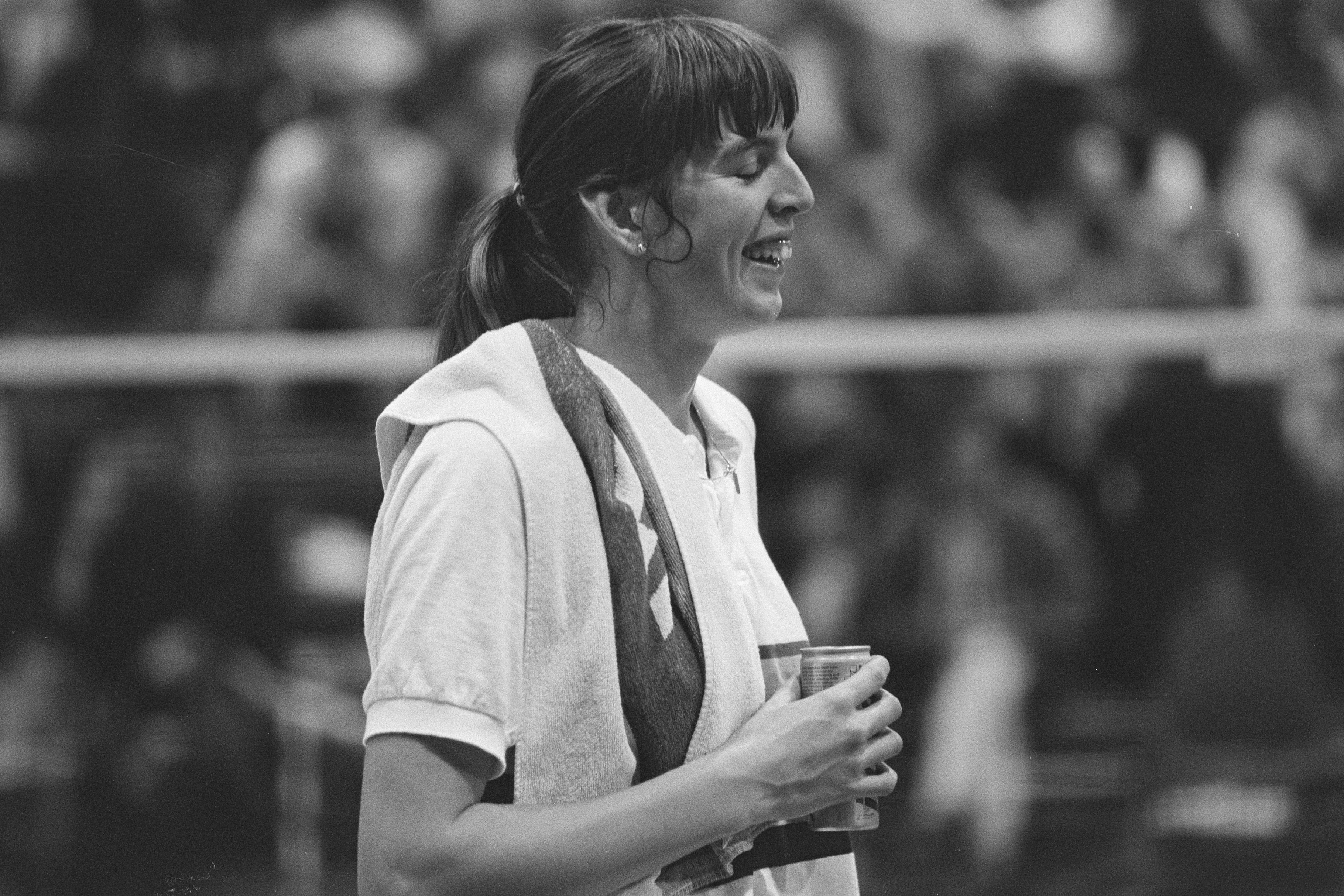 Collectie / Archief : Fotocollectie Anefo Reportage / Serie : [ onbekend ] Beschrijving : Nationaal kampioenschap badminton in Nieuwegein; Astrid van de Knaap Datum : 6 december 1986 Locatie : Nieuwegein Trefwoorden : BADMINTON, KAMPIOENSCHAPPEN Persoonsnaam : Astrid van de Knaap Fotograaf : Croes, Rob C. / Anefo Auteursrechthebbende : Nationaal Archief Materiaalsoort : Negatief (zwart/wit) Nummer archiefinventaris : bekijk toegang 2.24.01.05 Bestanddeelnummer : 933-8333